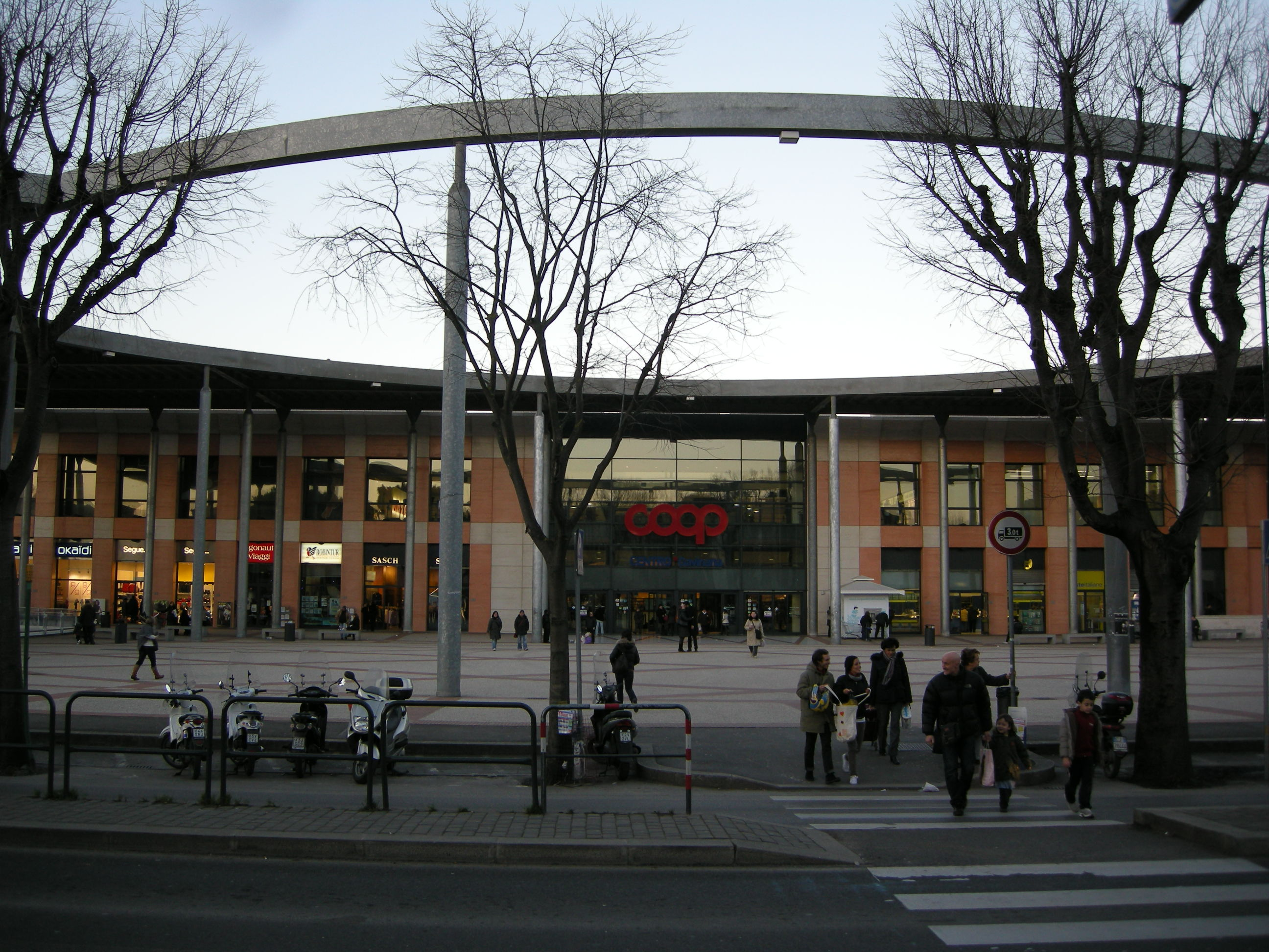 Coop gavinana firenze